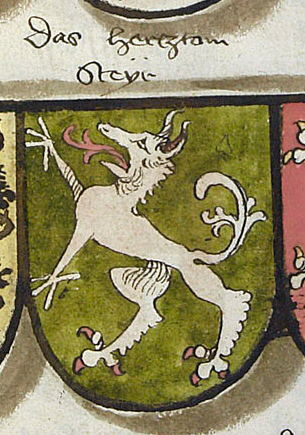 Das herztom Steÿr = Wappen des Herzogtums Steiermark (steirischer Panther), aus JÖRG RUGEN: WAPPENBUCH Pap. I, 317, I* Bl. 320x215. Bayern, um 1495/98, Innsbruck, Universitätsbibliothek, Cod. 545 (see Link)